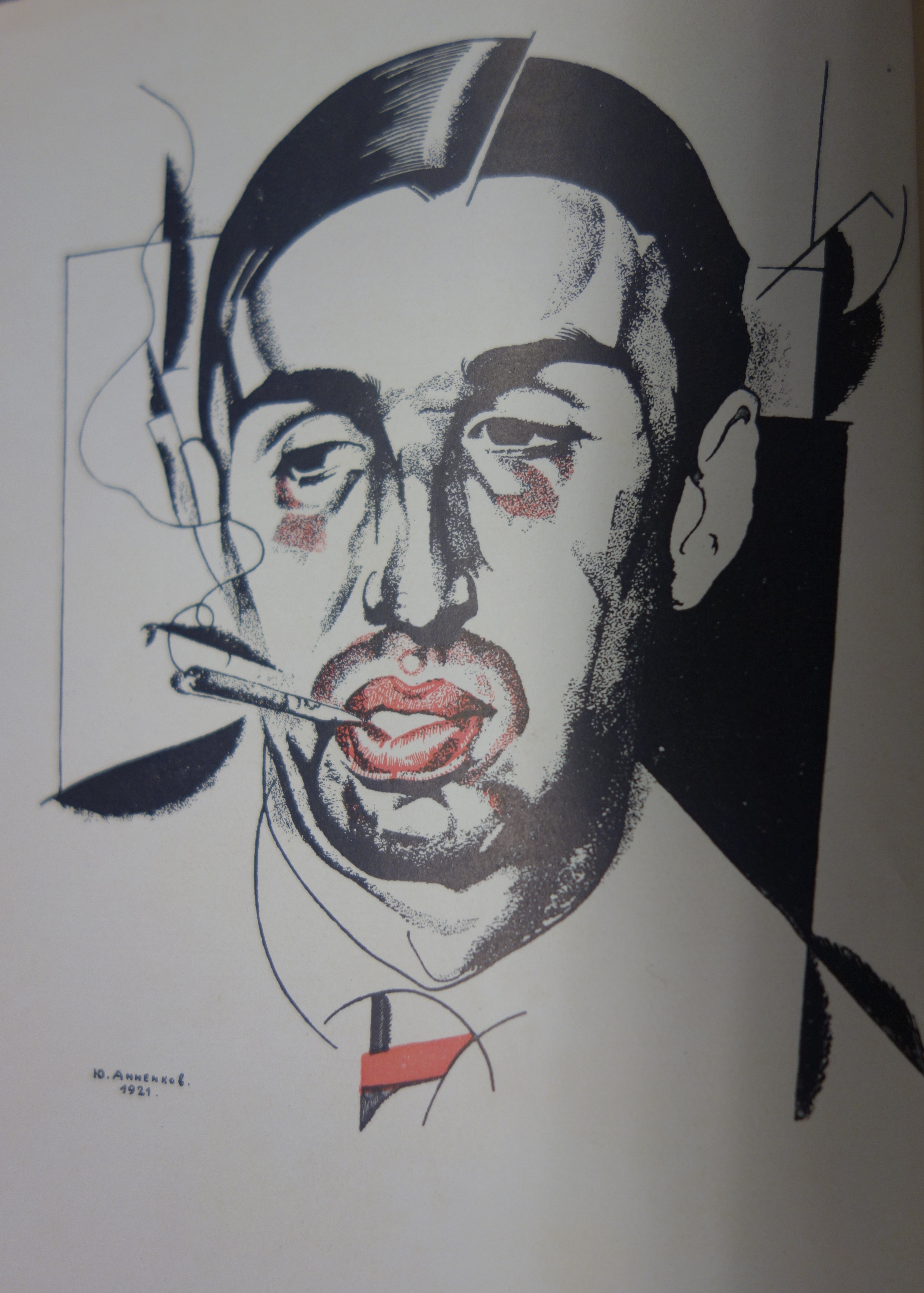 Georgij Iwanow. Porträtiert von Juri Pawlowitsch Annenkow 1921 Georgij Ivanov Русиньскый: Юрий Павлович Анненков Портрет Георгий Владимирович Иванов 1921